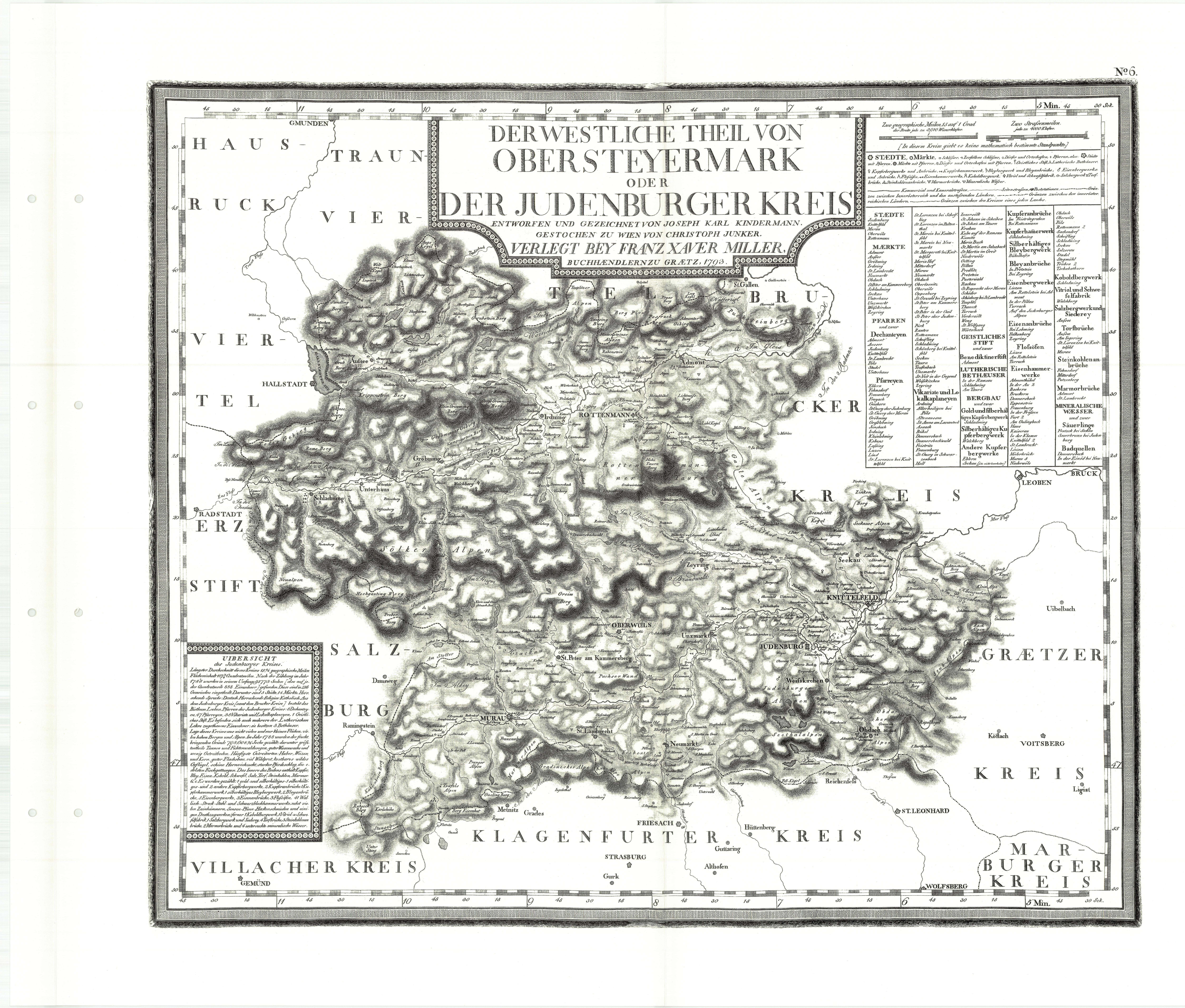 Der westliche Teil von Obersteiermark oder der Judenburger Kreis im Herzogtum Steyermark